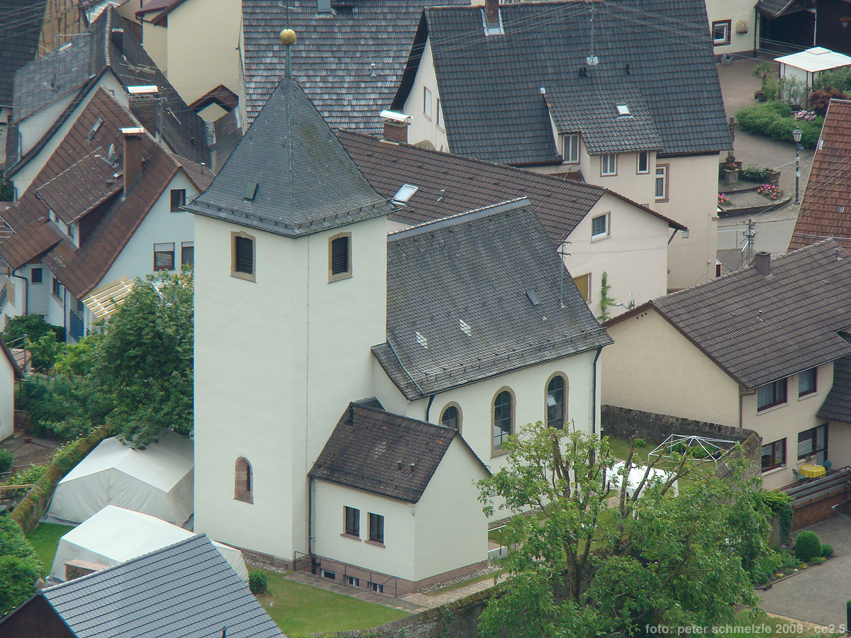 Katholische Kirche in Neckargerach-Guttenbach von der gegenüberliegenden Neckarseite aus gesehen